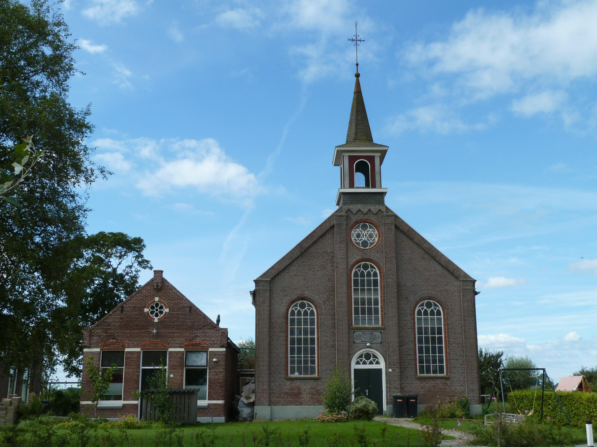 Voormalige gereformeerde kerk van Ezinge